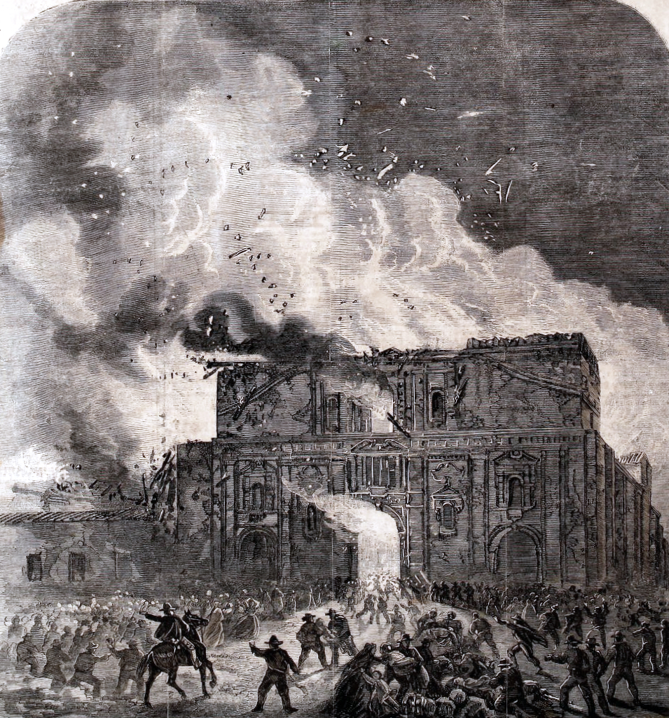 Incendio de la Iglesia de la Compañia